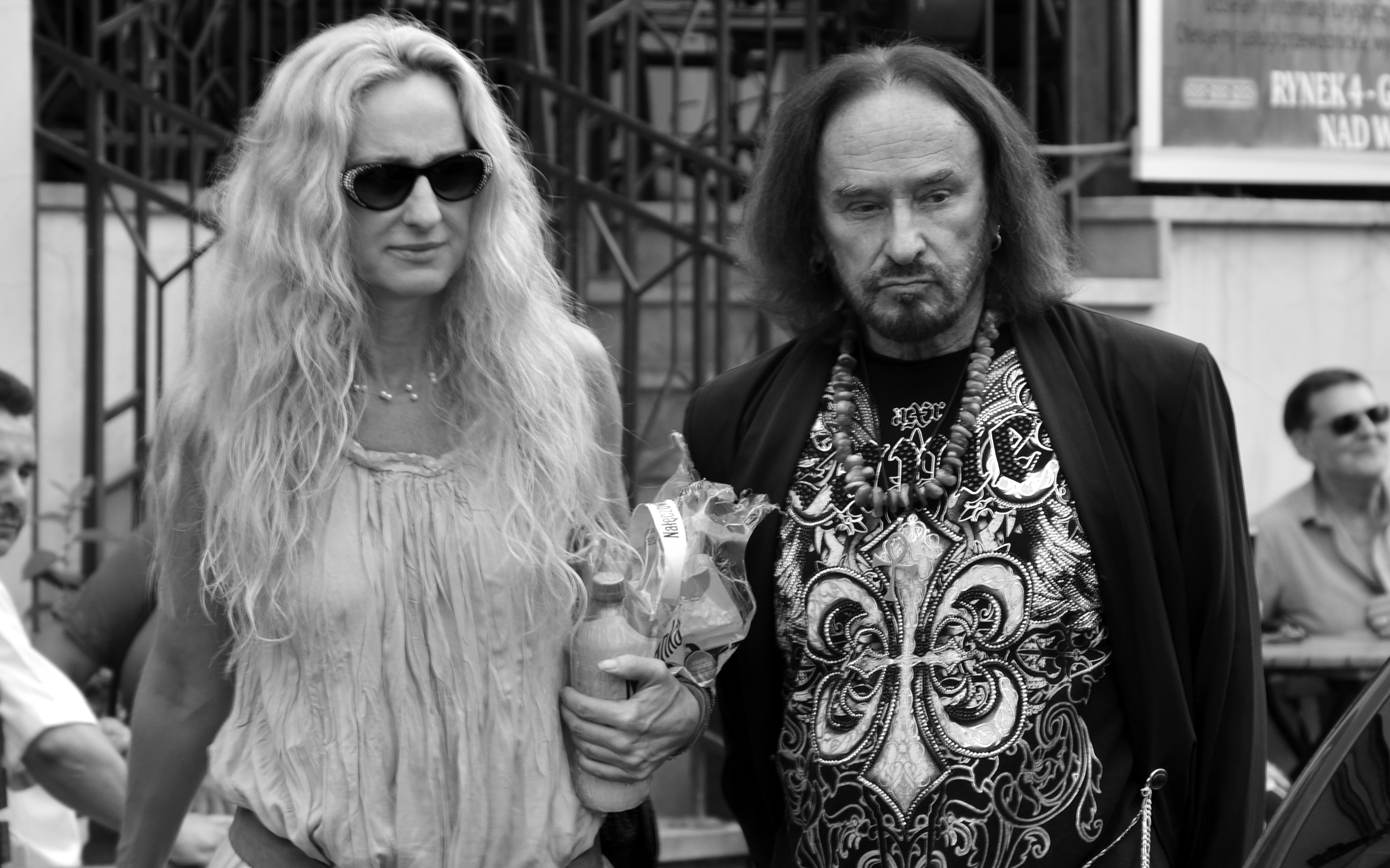 Anna Maleady und Stan Borys bei dem Sommer mit Kultur in Bielitz, Bielsko-Biała